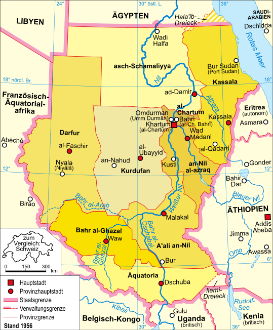 Politische Karte des Sudan (Stand 1956)